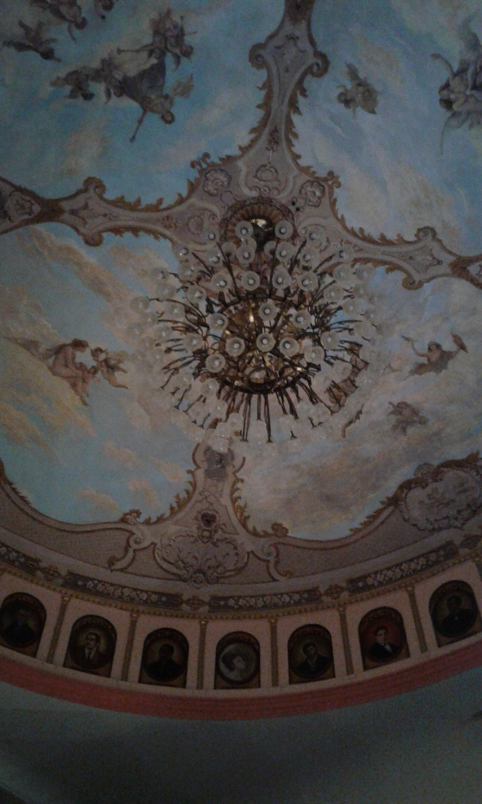 Orgullo de la ciudad de Avellaneda, provincia de Buenos Aires. Hace 113 años este magnífico teatro es emblema de arte y cultura. Ha sido declarado Monumento Histórico Provincial y Nacional. Imponente en su fachada por el estilo de renacimiento italiano, al ingresar a la majestuosa sala se destaca la cúpula con alegorías pintadas por Antonio Epifani. En el centro de la misma la imponente araña de bronce, con tulipas de vidrio, ilumina la sala. La foto fue tomada desde el punto de acústica máximo (fila 6).